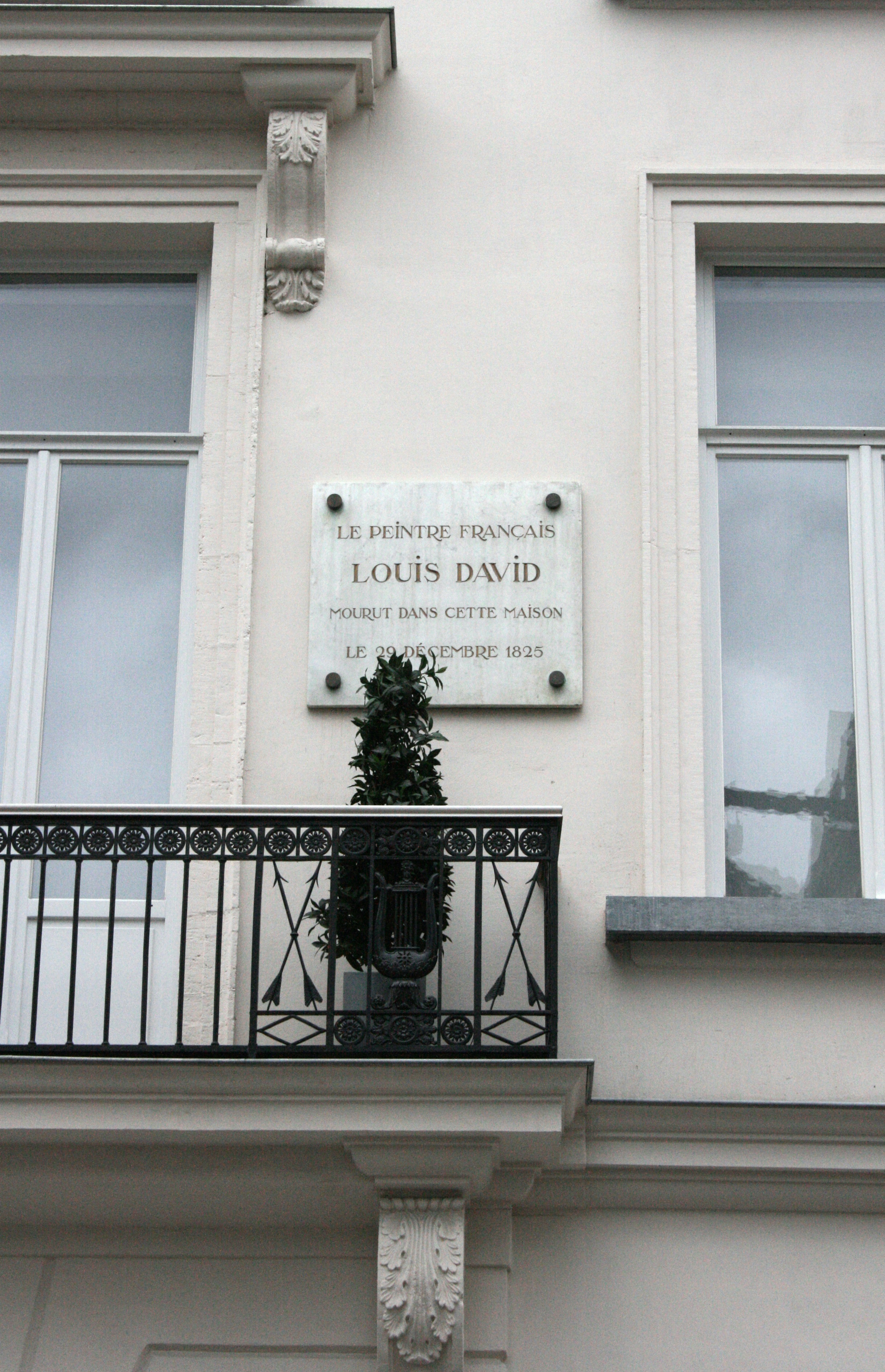 Rue Léopold 5-7, Bruxelles (Belgique). Maison où décéda le peintre français Jacques-Louis David. Plaque commémorative